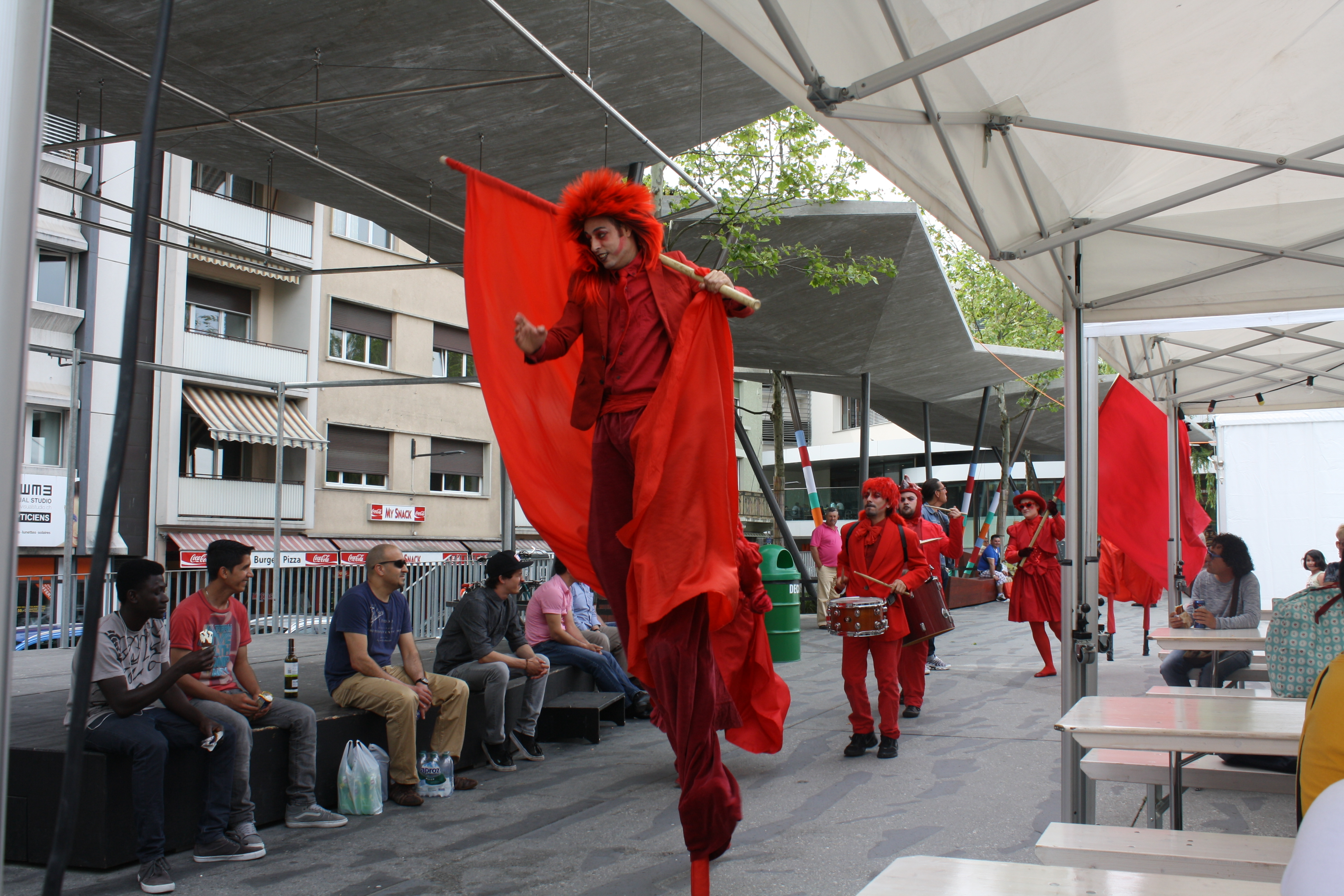 Spectacle déambulatoire "La Vague rouge" de Zanco, cie genevoise de théâtre de rue, créé et 2007 et tourné régulièrement depuis. Cette photo a été prise à Renens, Suisse, en 2013, lors du festival Tarmac.